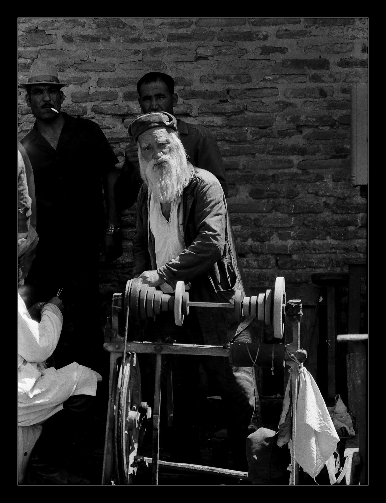 Aasia turg 1977. aastal